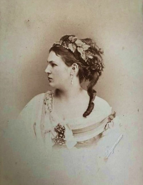 Шипова Софья Петровна (1846—1911)